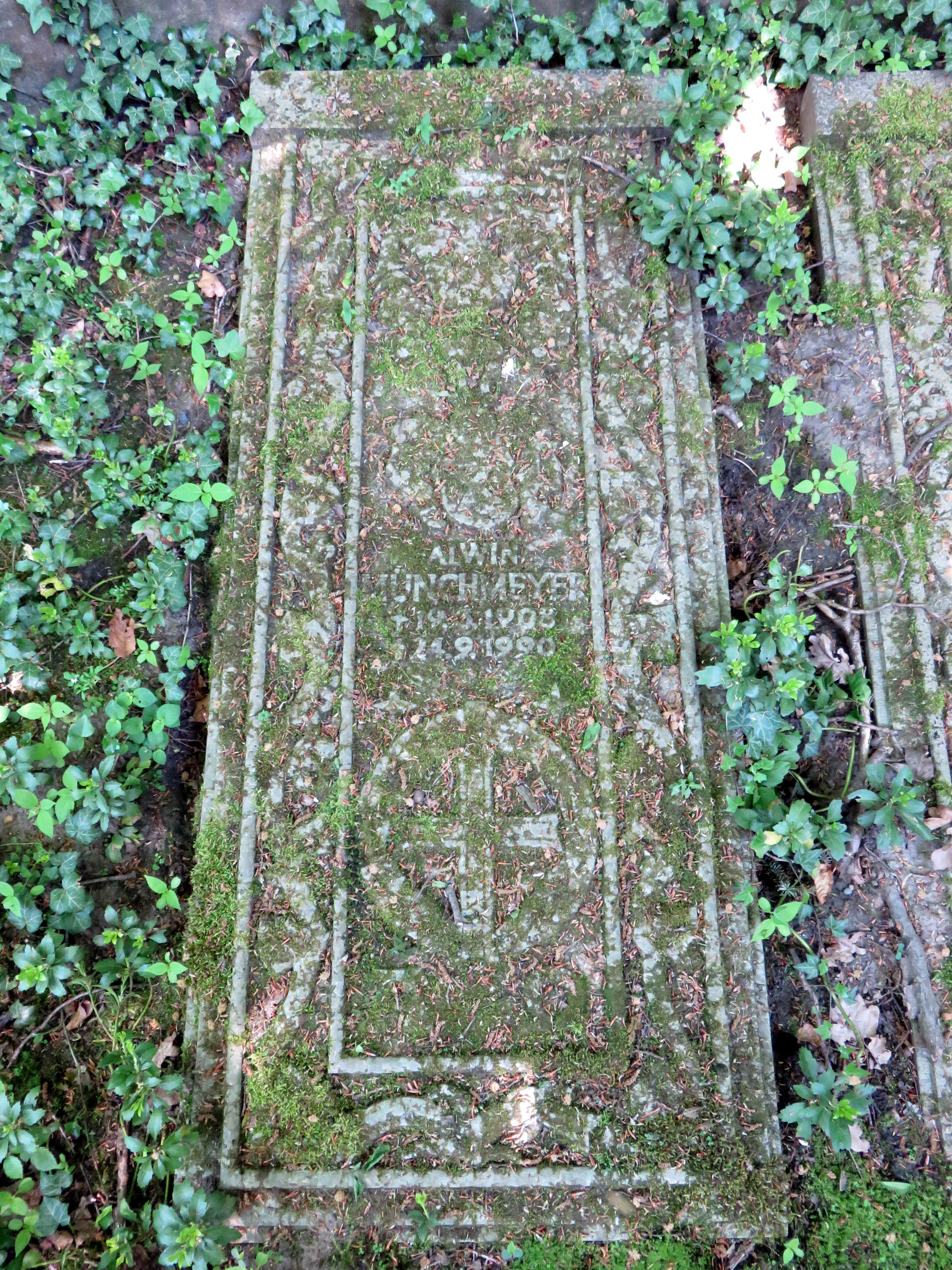 Grabplatte für den deutschen Unternehmer Alwin Münchmeyer, Sohn des Hamburger Kaufmanns Hermann Rudolf Münchmeyer, im Bereich der rondeelartigen Familiengrabanlage auf dem Ohlsdorfer Friedhof in Hamburg.